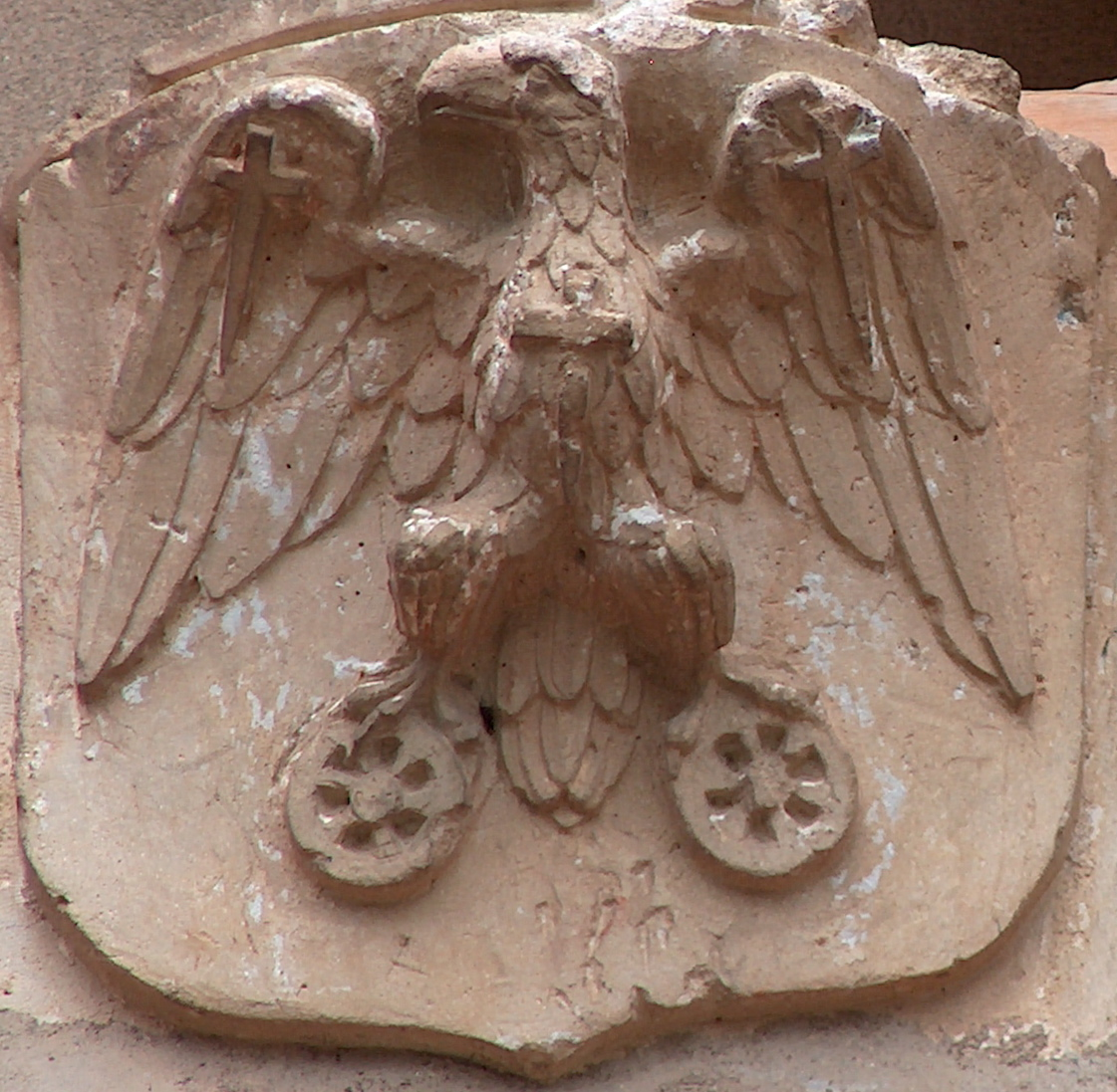 Description : Blason de Jean de Mansencal posé sur l'église de Grépiac (31) Source : photo prise par Olivier Mansencal